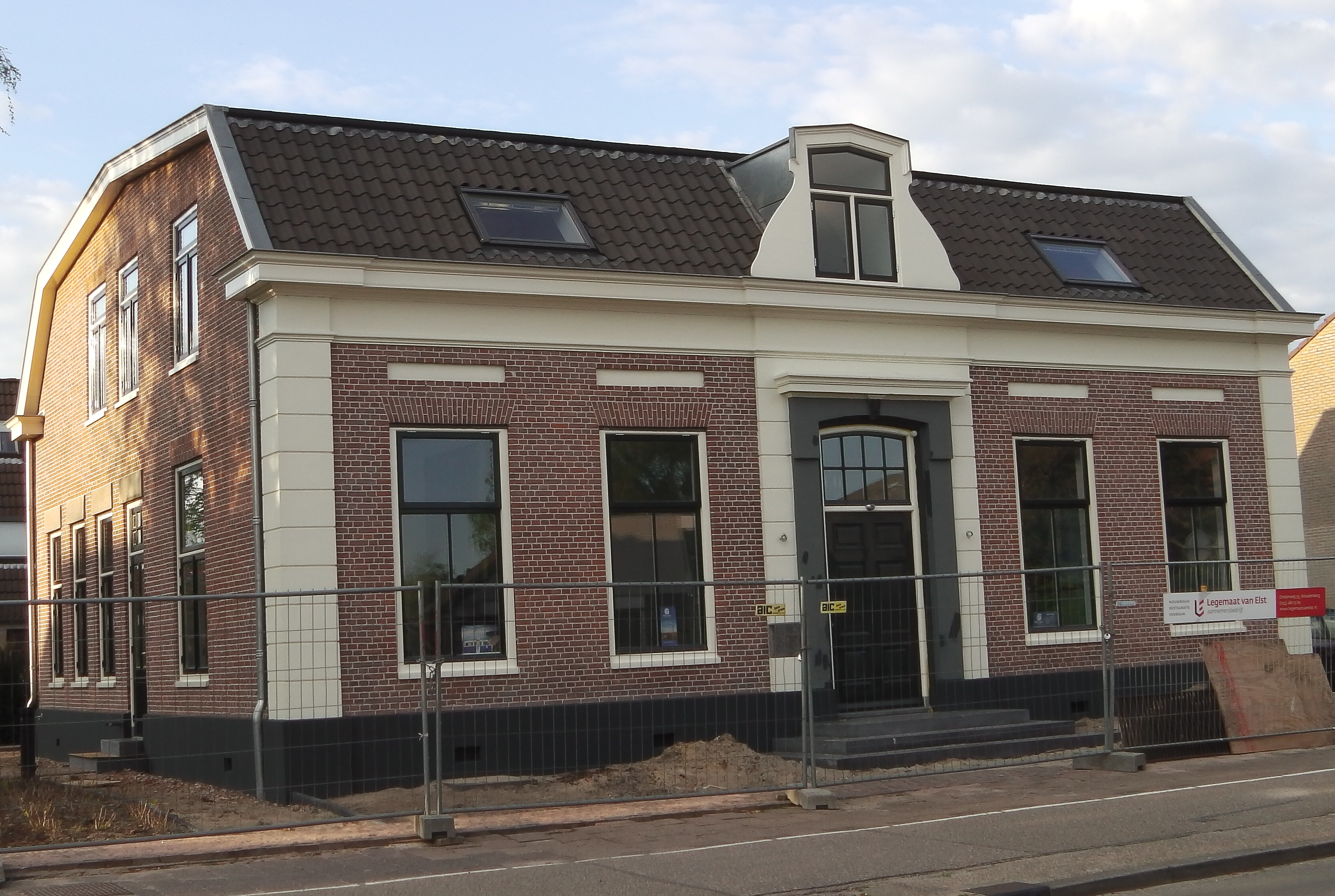 Het oude gemeentehuis van Leusden dat dateert uit 1880. Op de foto tijdens de renovatiewerkzaamheden.